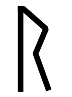 runic letter raido